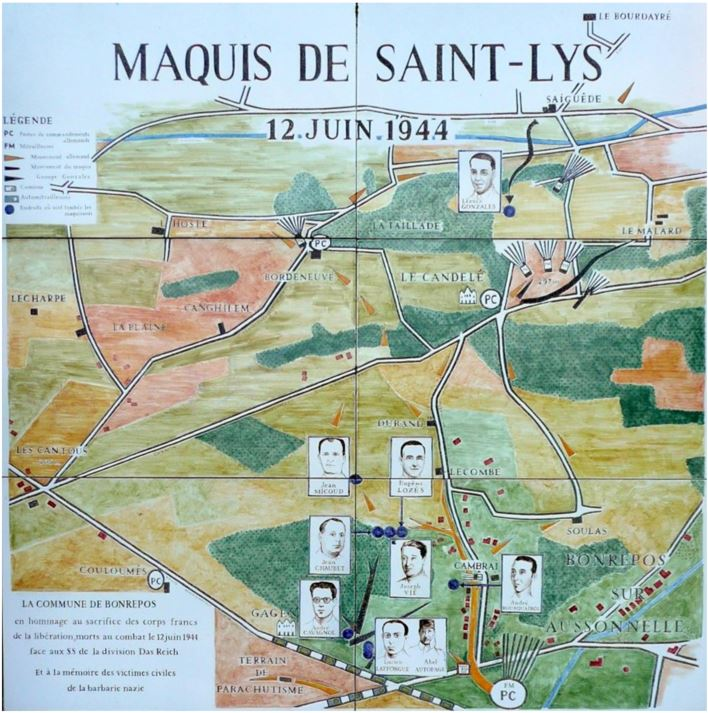 Photo du monument de Bonrepos-sur-Aussonnelle situé au carrefour de la route vers Saint-Lys. On peut y voir une carte qui explique le combat du 12 juin 1944.